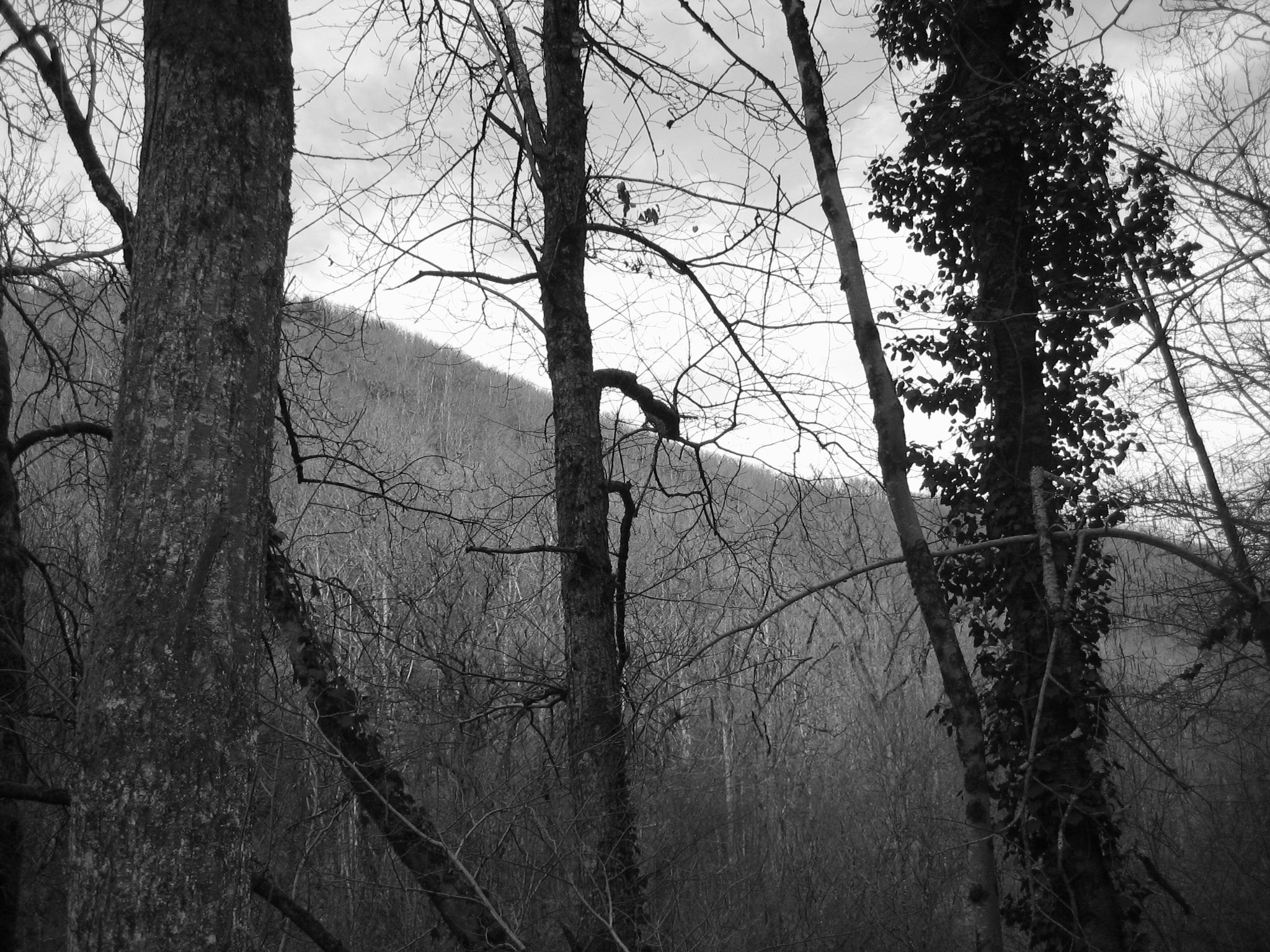 Una val que desemboca sus la de Viaur. Mòstra la pregondor de las gòrjas e lo perque de son importéncia dins la literatura occitana.